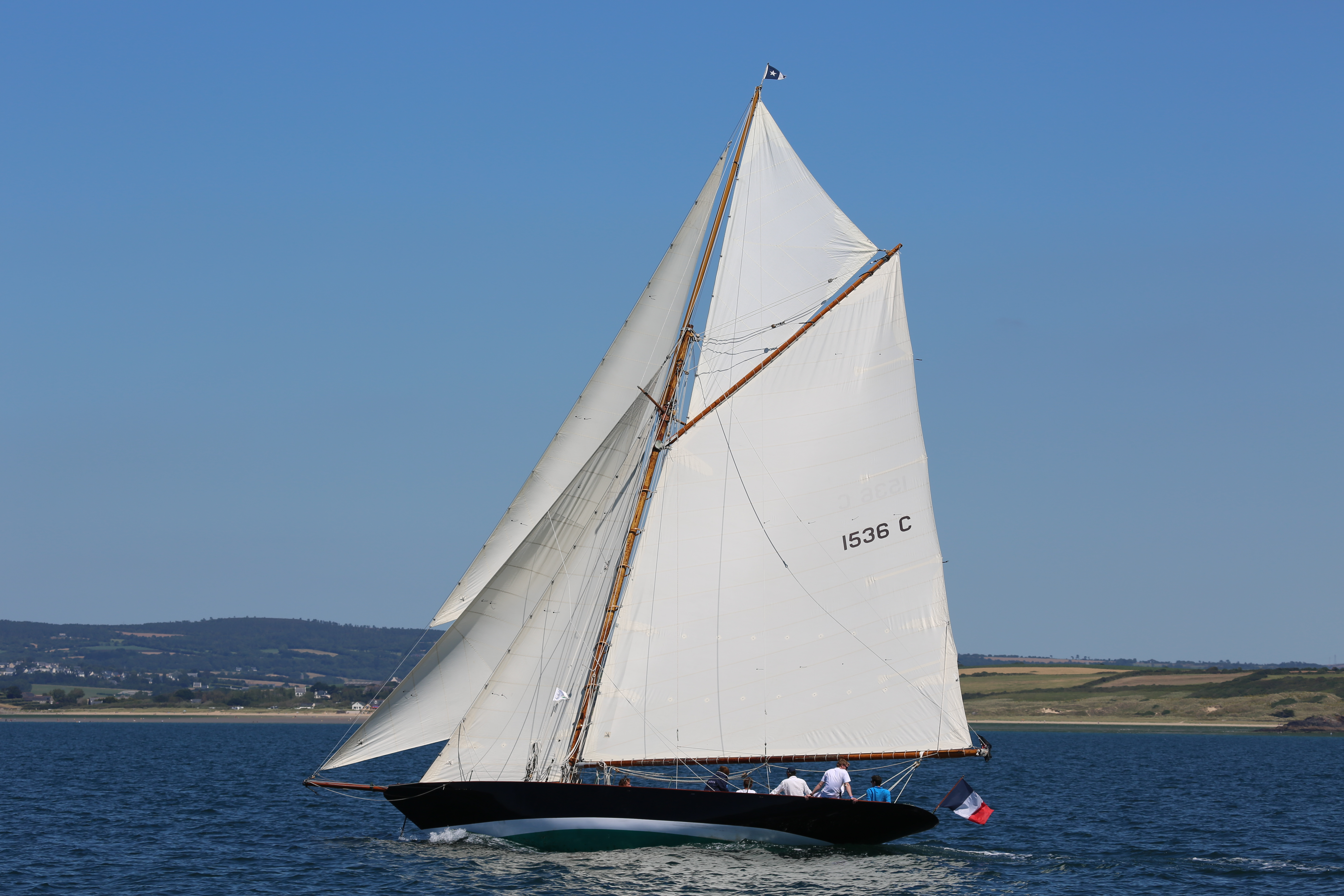 Pen Duick à "Temps fêtes" Douarnenez 2012